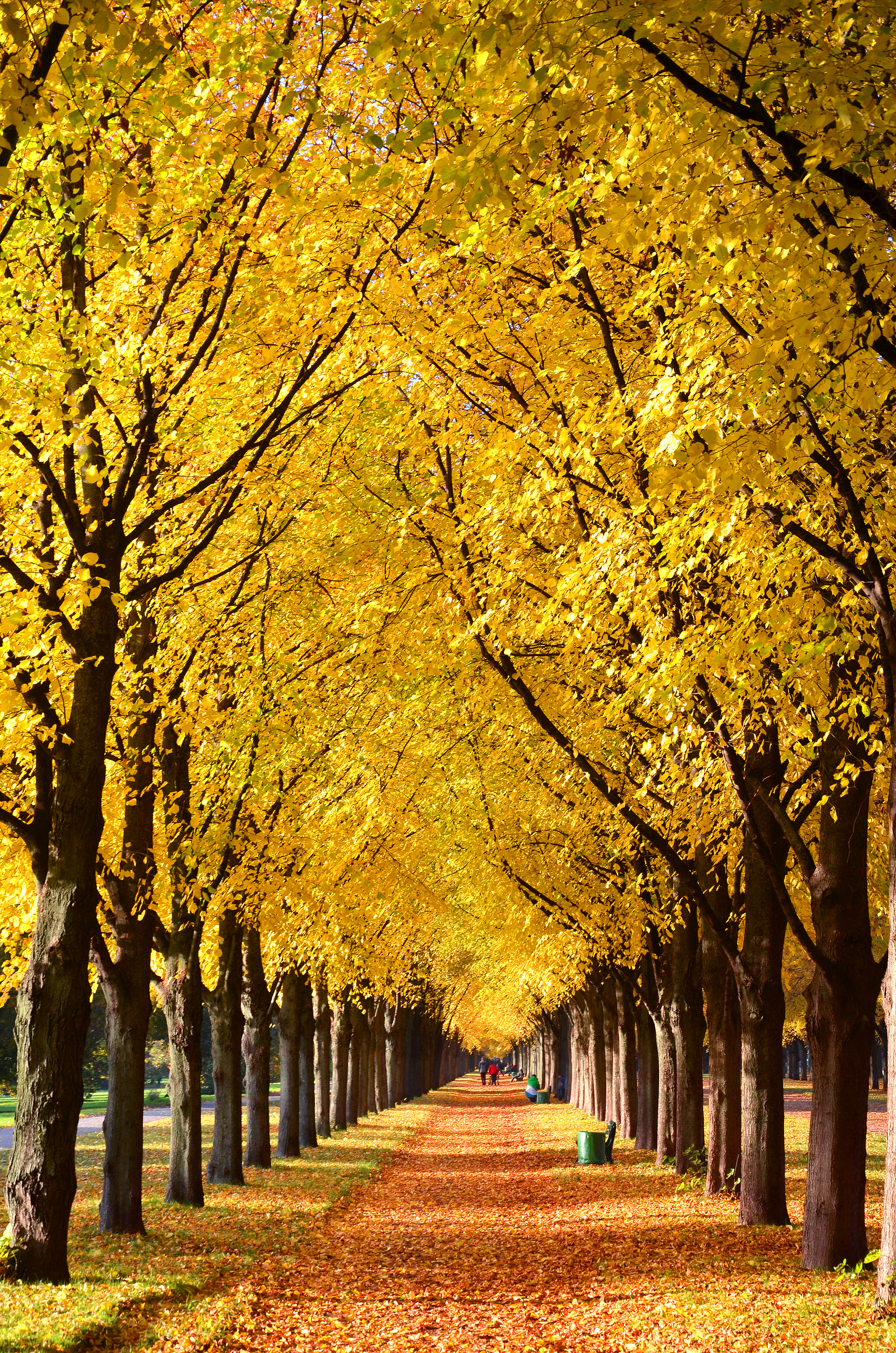 Einmal eine Pause machen von den Computern im Wikipedia-Büro Hannover und - zu Fuß in wenigen Minuten zu erreichen - zu zweit das Schauspiel der Linden im Goldenen Oktober in Hannovers Georgengarten einfangen. Licht tanken, Farben für die Seele, den Menschen ein Lichtbild schenken, vom Nachmittag des 26. Oktobers 2015 in der Herrenhäuser Allee (mit Blick in Richtung des Großen Gartens Hannover Herrenhausen ...